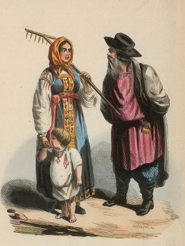 Русские крестьяне Тверской губернии 1844 г. Рисунок из книги: Wahlen A. Moeurs, usages et costumes de tout les peuples du monde. T. I. Bruxelles, 1844. P. 62.